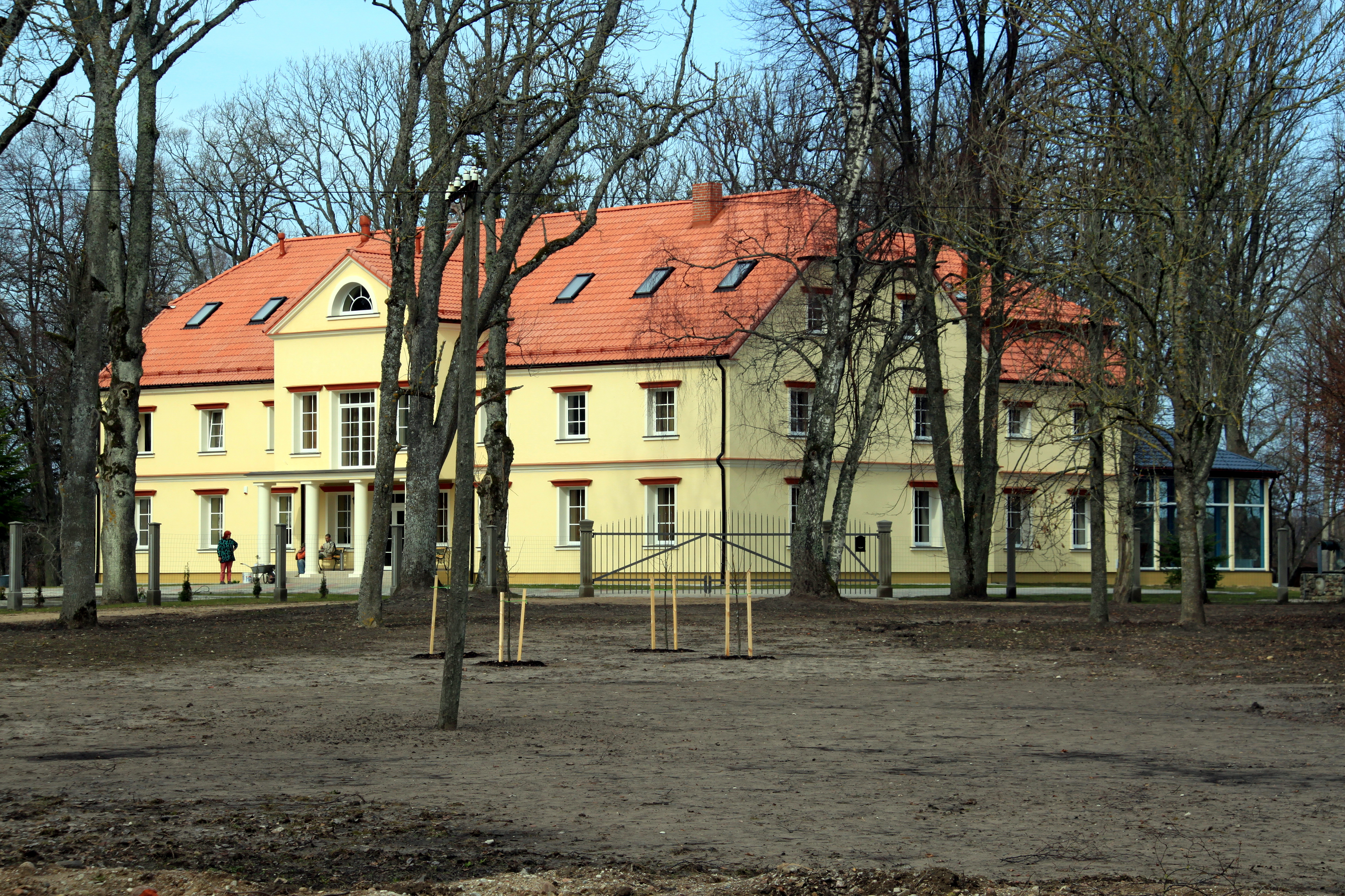 Ziemupe